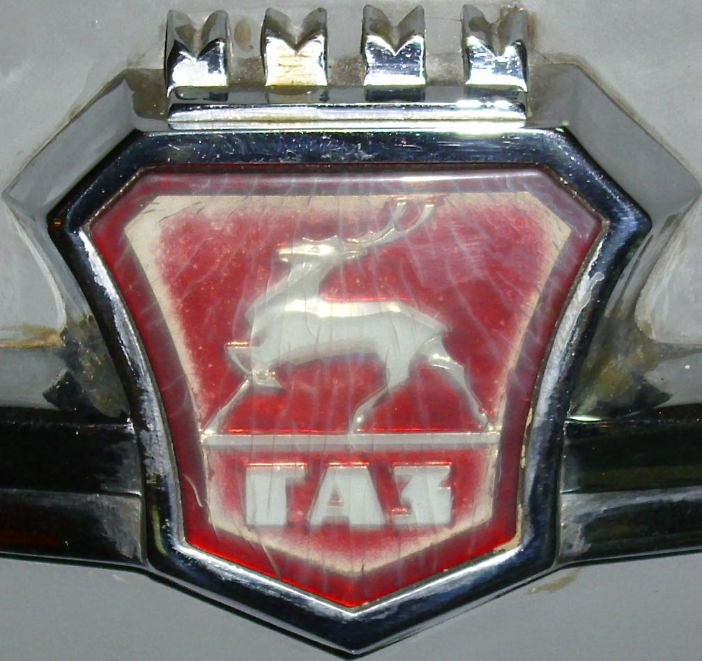 Emblem GAZ an einem Wolga